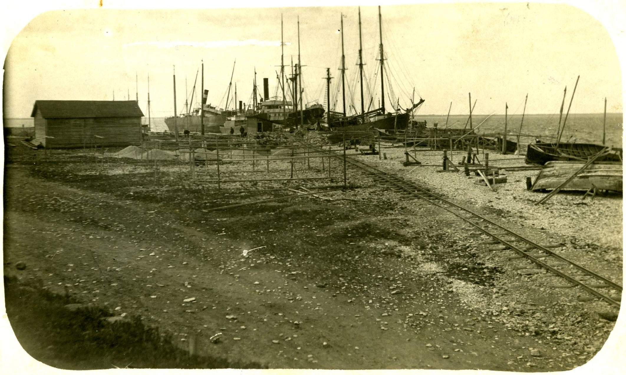 Jaagarahu sadam